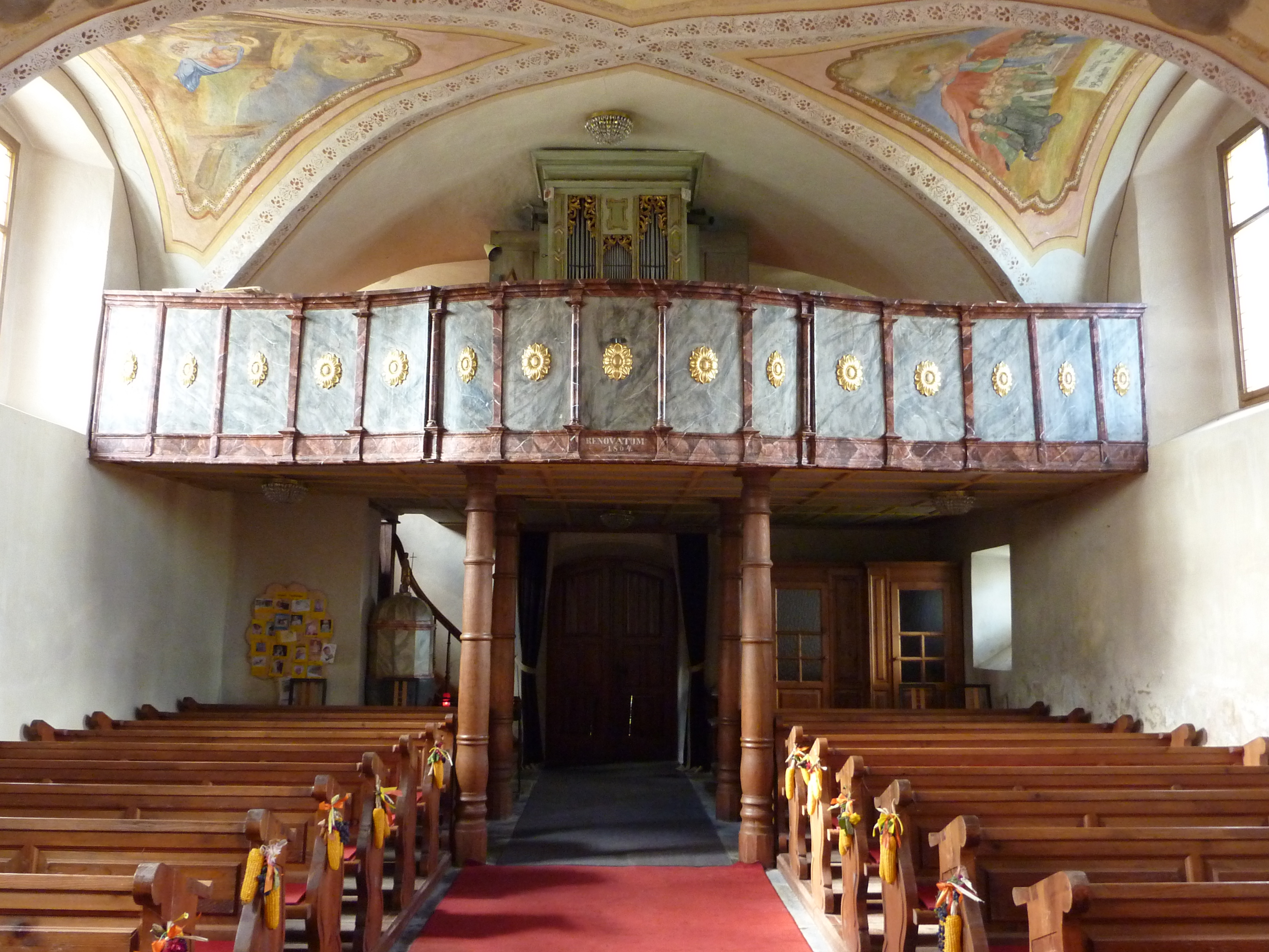 Pfarrkirche hl. Martin, Sankt Martin am Wöllmißberg, Steiermark - Orgel